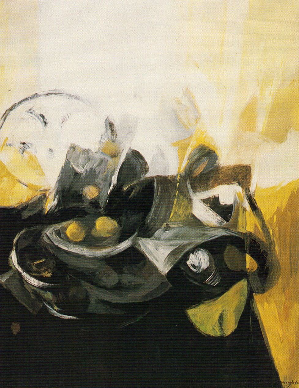 Ruizanglada La Mesa Negra 137x105 Bodegón 1989